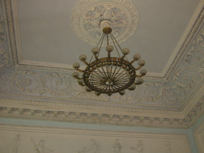 стеля